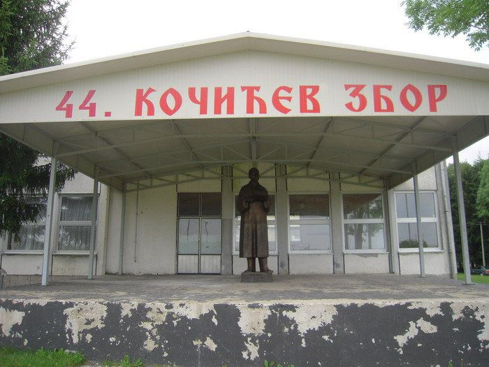 44._Кочићев_збор